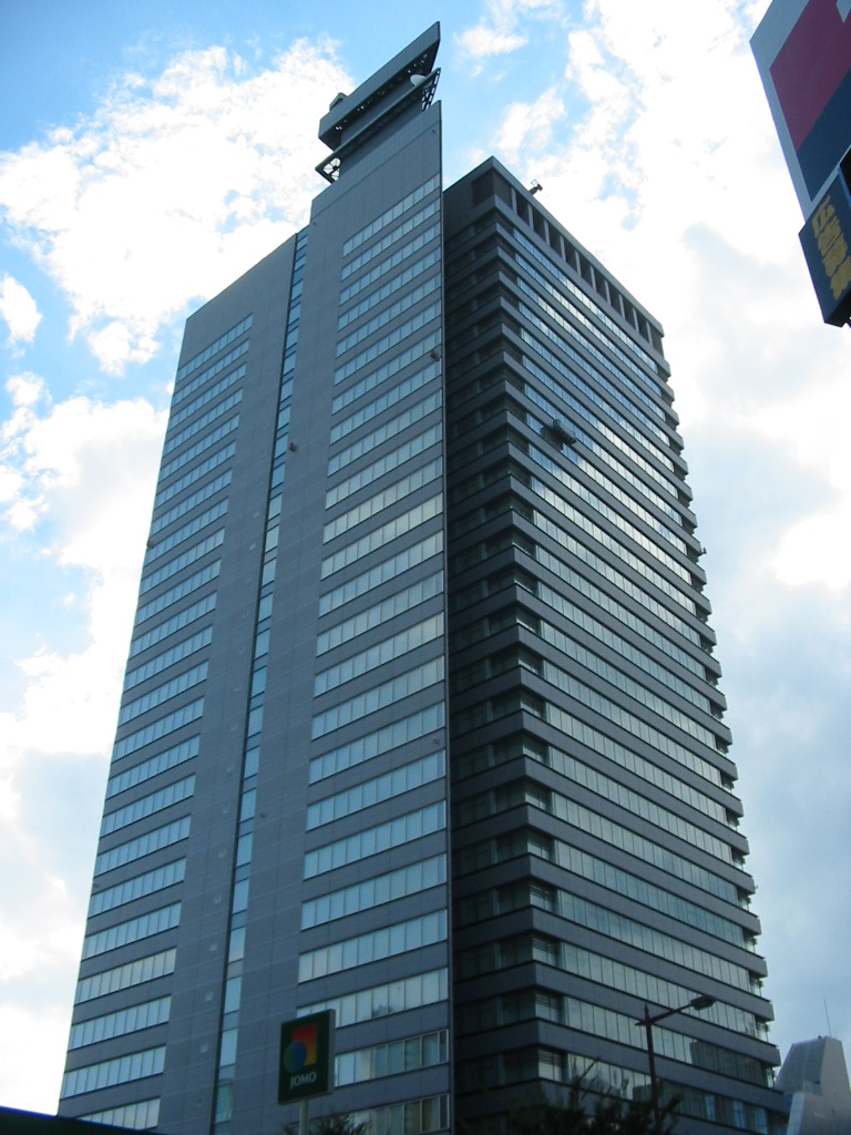 撮影日 - ja:2007年ja:9月8日 撮影者 - FM827 Licensing 2007年9月8日撮影。国道45号線ja:花京院交差点より撮影。